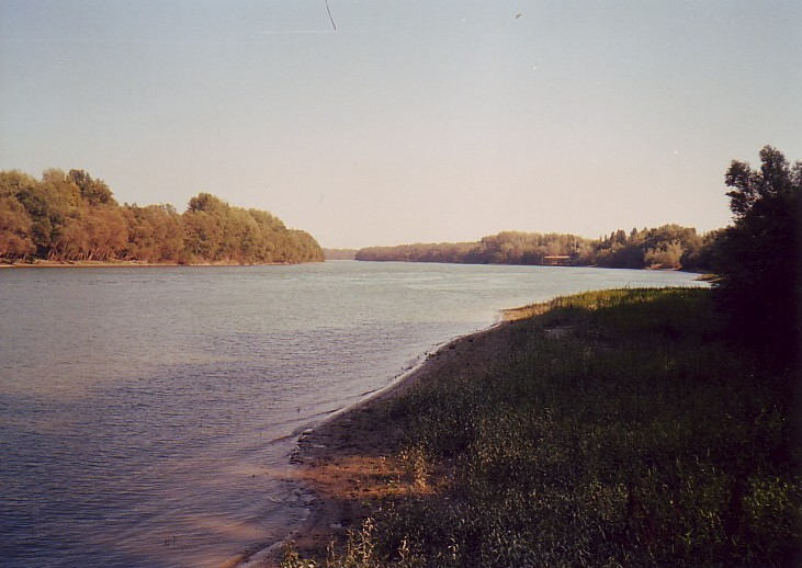 Dunabogdányi Dunapart